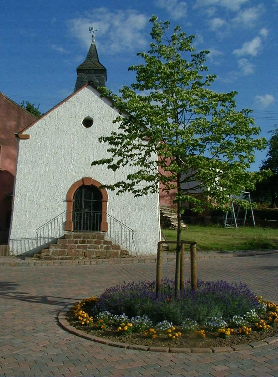 Au0enansicht der Filialkirche im Ortsteil Hamm, Taben-Rodt